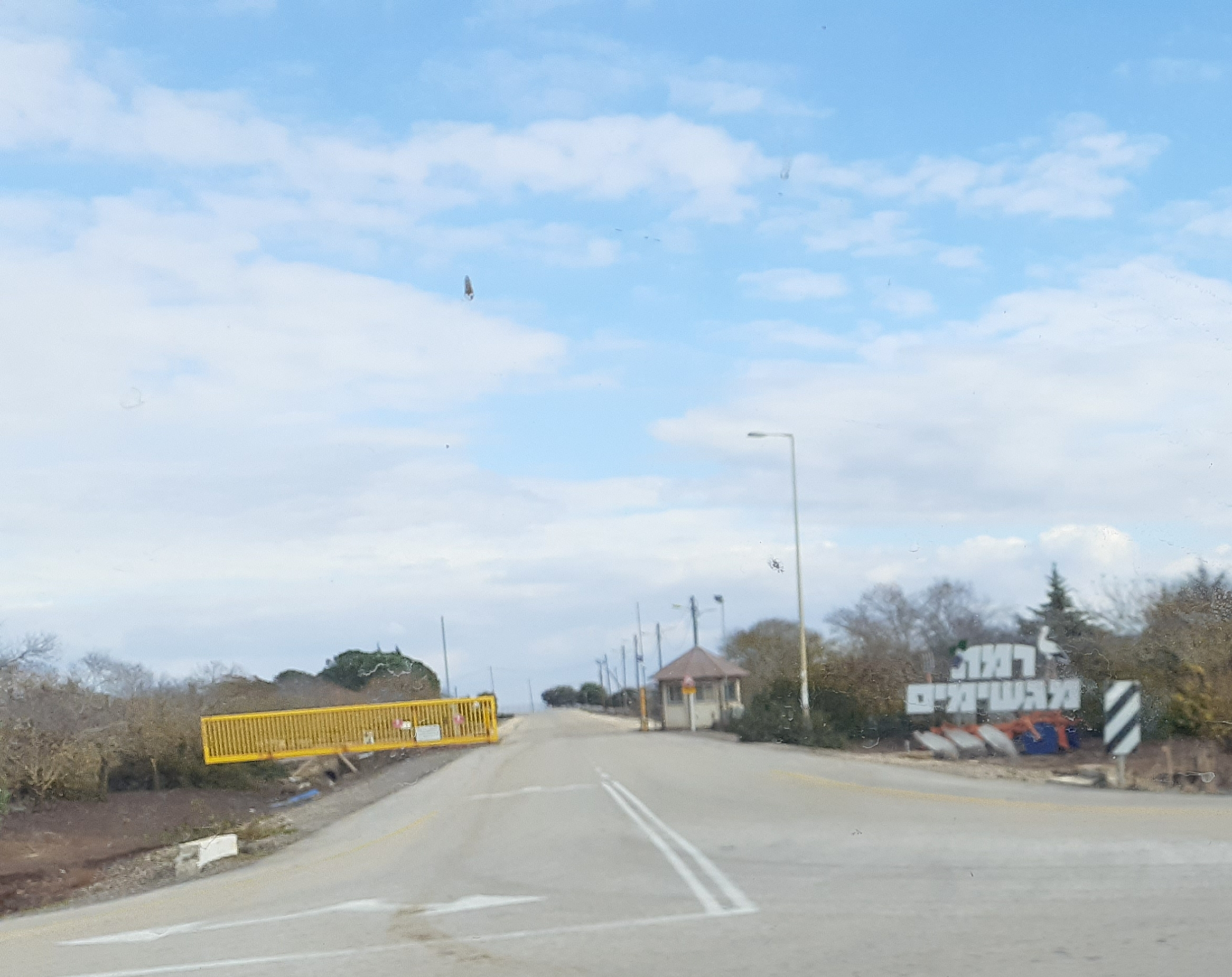 כביש כניסה לרמת מגשימים